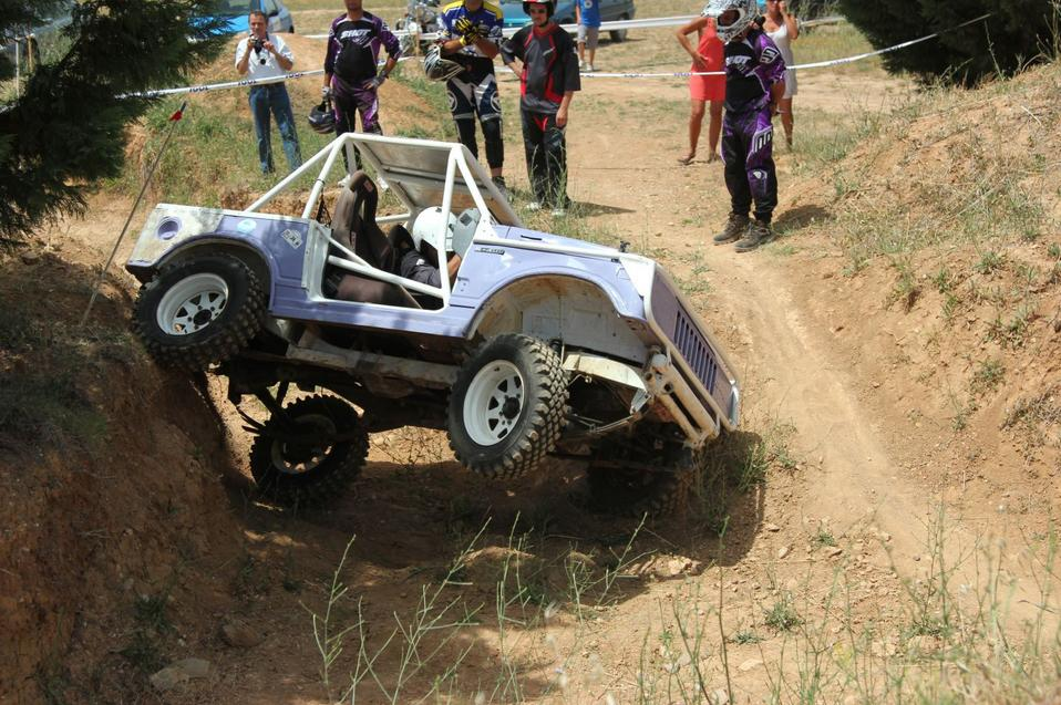 Trial d'Eguilles 2012 - Fred Fossat - Catégorie Super Serie